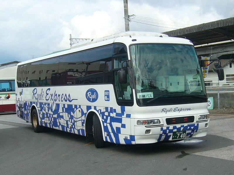 登録番号 岡山200か・740 両備バス所属 龍馬エクスプレス号用 2006年10月2日 高知駅前にて撮影